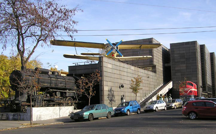 Transport Museum, Budapest